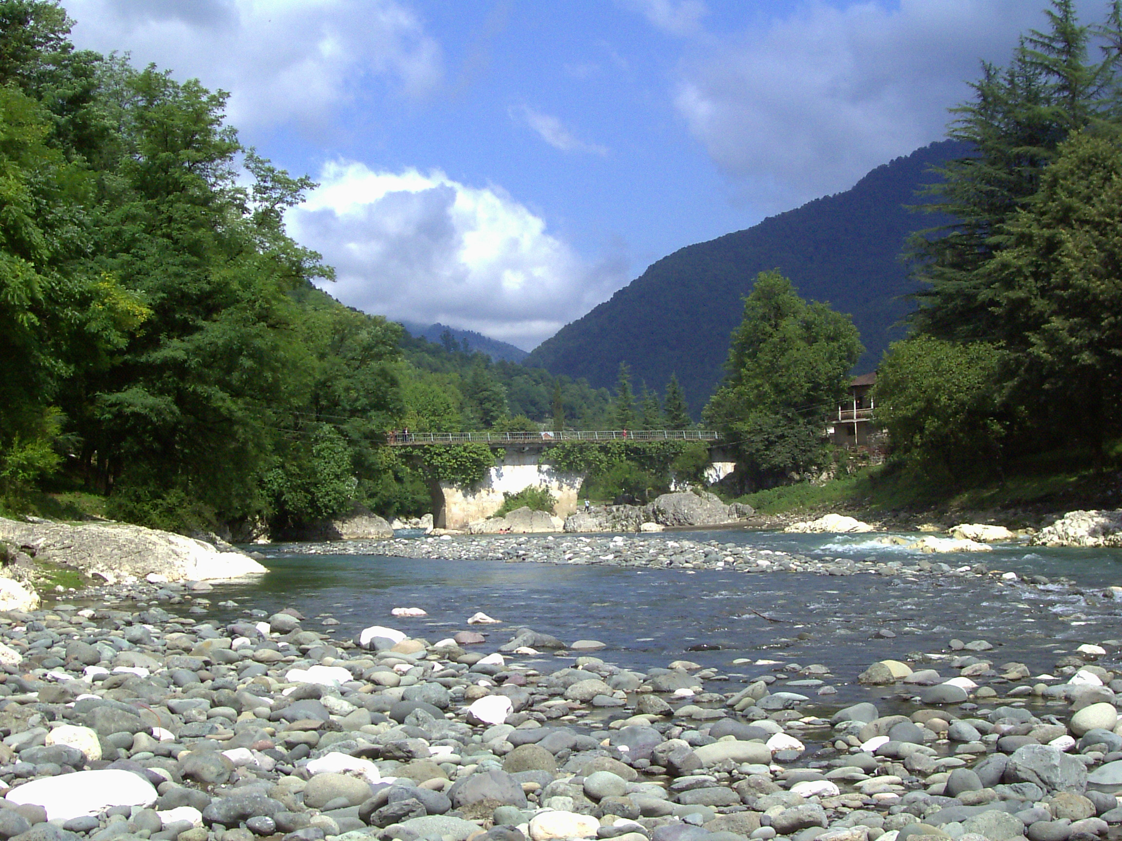 Blick vom Ufer des Khobistskhali auf die Dorfbrücke